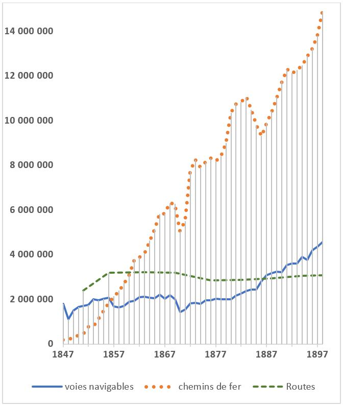 Volume de transport par route, voie navigable et rail en France 1847-1898 (millions de t/km).